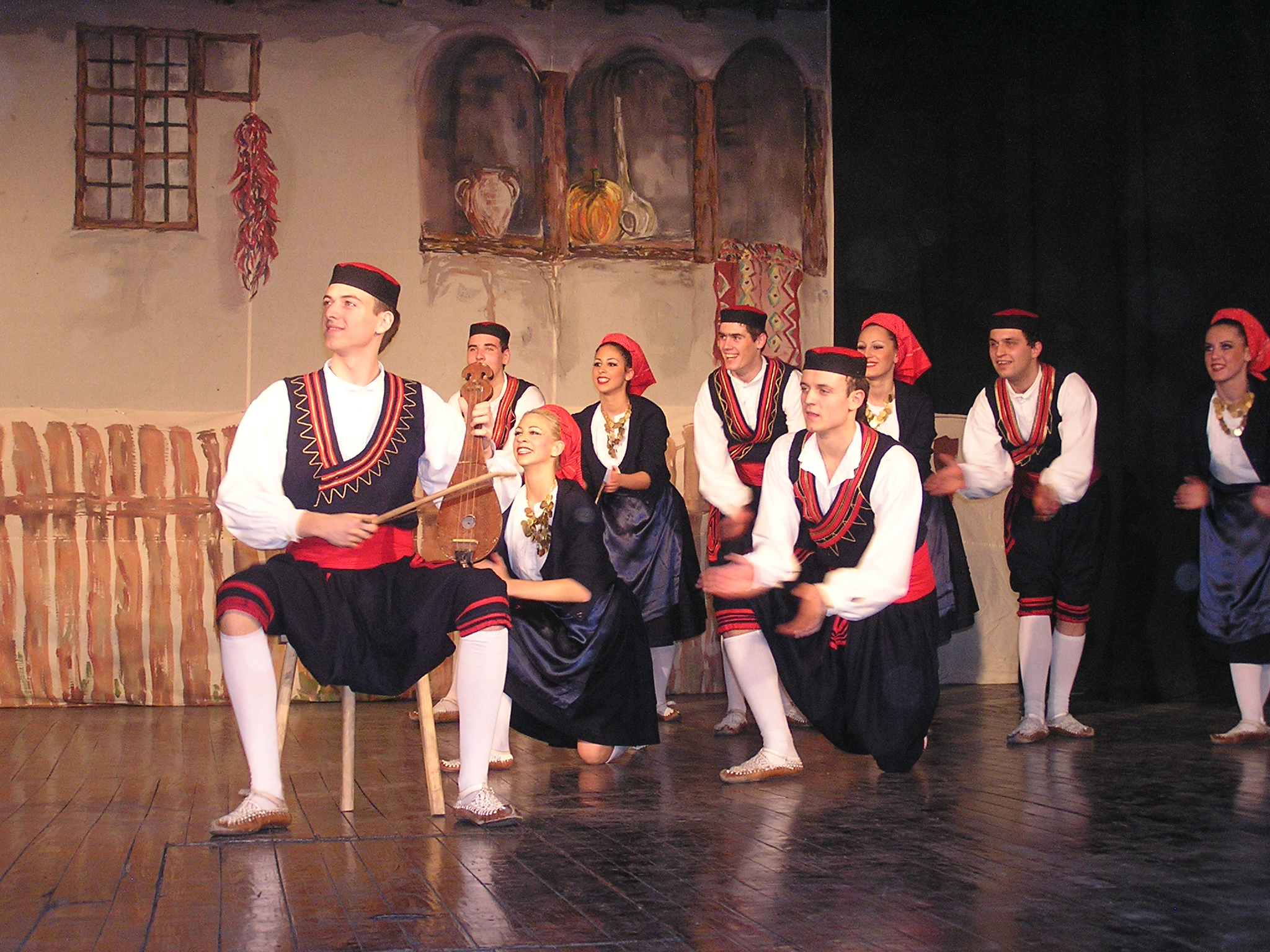 Godišnji koncert 24. decembar 2005./ Nova Pazova